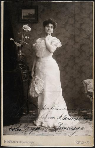 Melanie Domenego, österreichische Theaterschauspielerin